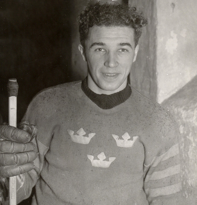 Åke Lassas